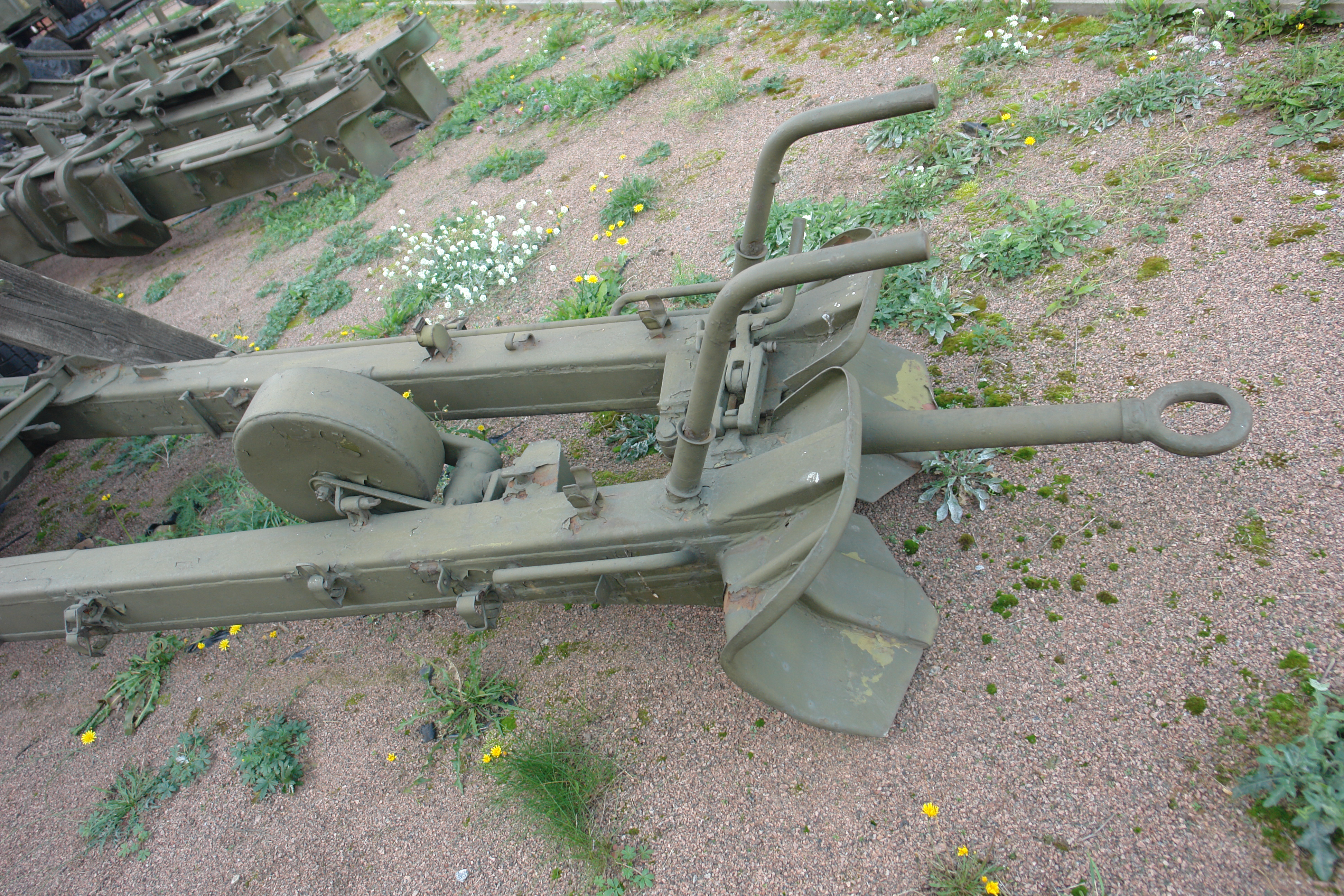 100-мм ПРОТИВОТАНКОВАЯ ПУШКА МТ-12(2А29) ПРИНЯТА НА ВООРУЖЕНИЕ В 1968 г. ГЛАВНЫЙ КОНСТРУКТОР Г.И.ЛУКЬЯНЧЕНКО. ДАЛЬНОСТЬ, М: СТРЕЛЬБЫ-8200, ПРЯМОГО ВЫСТРЕЛА - 1880. СКОРОСТРЕЛЬНОСТЬ - ДО 14 ВЫСТР/МИН МАССА ОРУДИЯ-3100. РАСЧЕТ 7 человек Военно-исторический музей артиллерии, инженерных войск и войск связи, Санкт-Петербург.